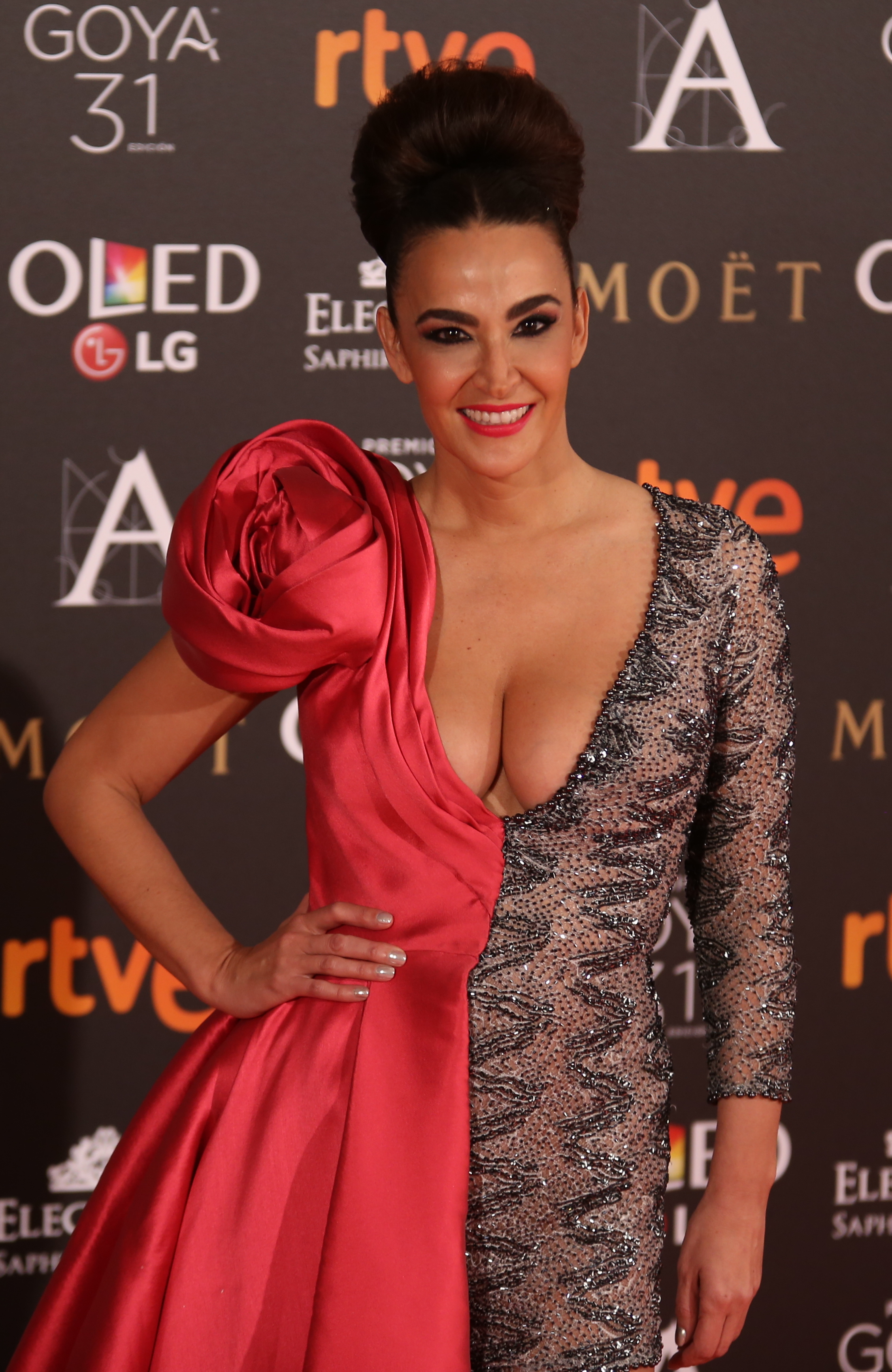 Premios Goya 2017